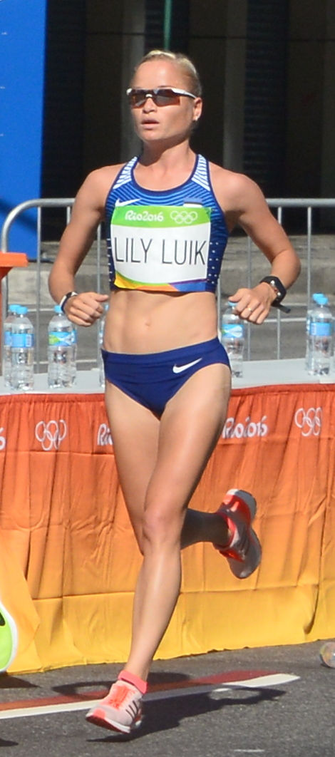 Passage du marathon des jeux olympiques de Rio 2016 dans le centre de Rio